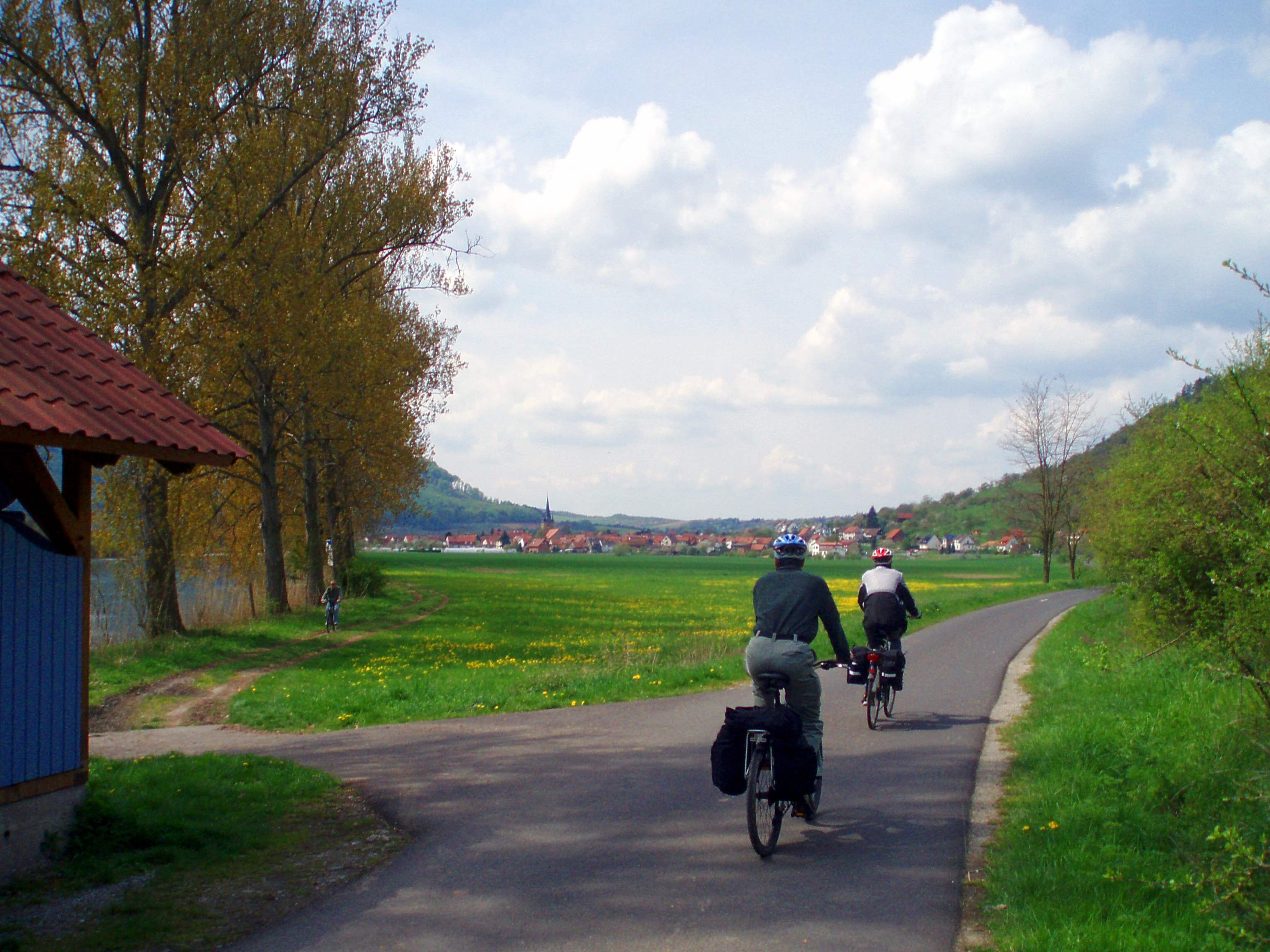 Der Werratal-Radweg bei Falken, línks die Werra